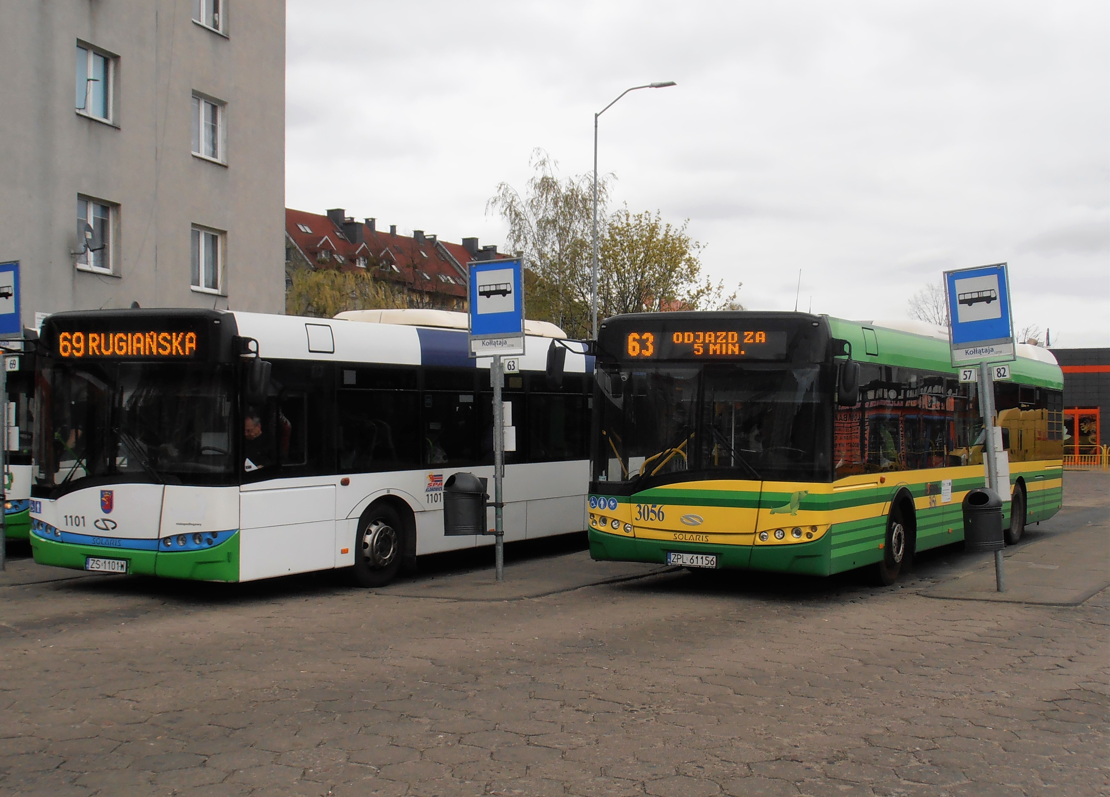 Postój autobusów linii nr 69 oraz 63 na pętli Kołłątaja w Szczecinie, 2019 r.